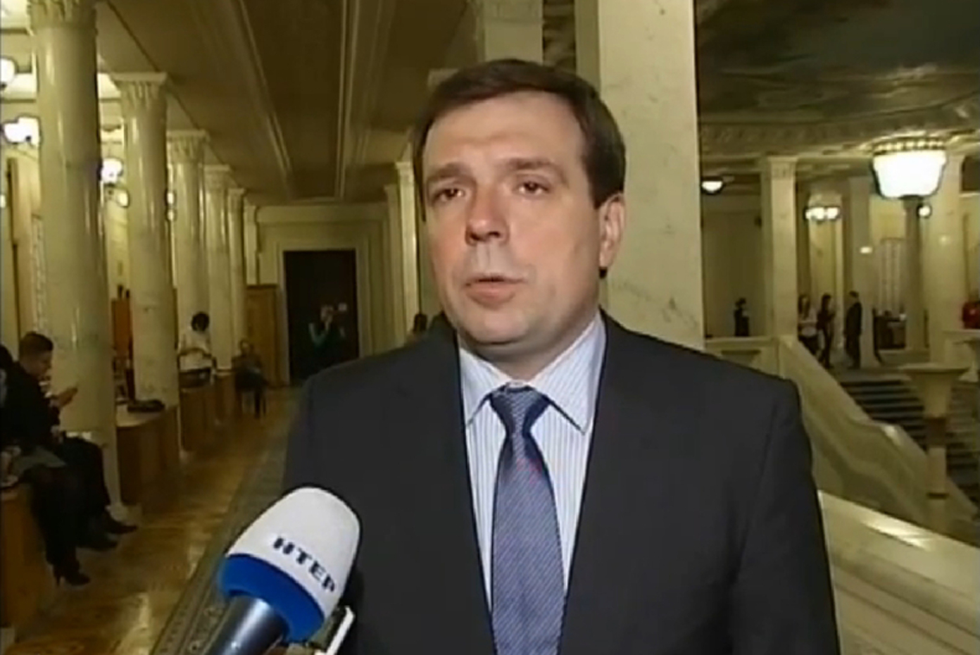 Скорик Микола Леонідович — український політик, державний діяч, член Партії регіонів; голова Одеської обласної державної адміністрації (з 8 листопада 2013 по 3 березня 2014), народний депутат 8-го скликання.